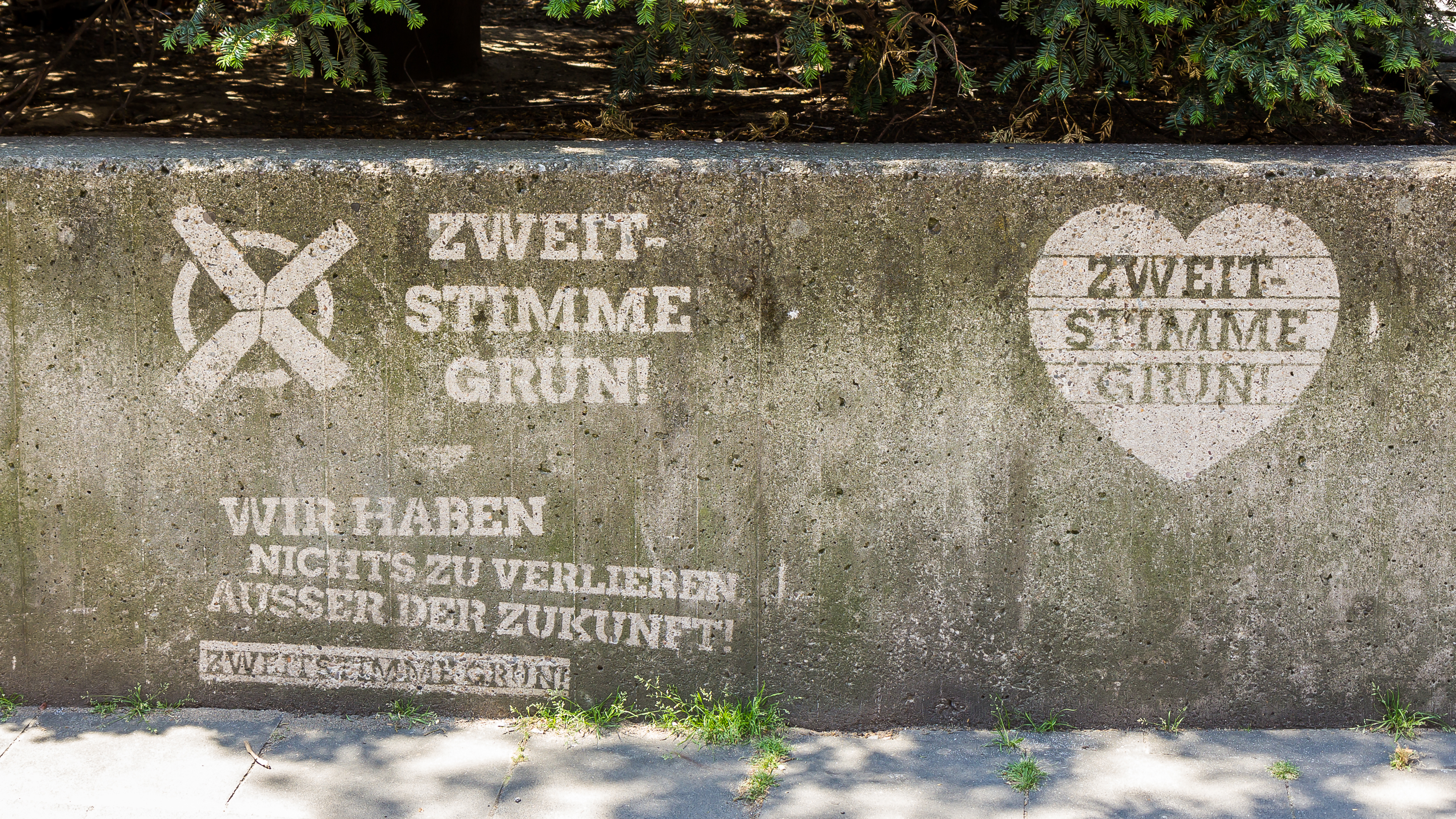 Reverse Graffiti an einer Betonmauer am Quatemarkt Köln. Aktion "Zweitstimme Grün" für die Landtagswahl NRW 2017